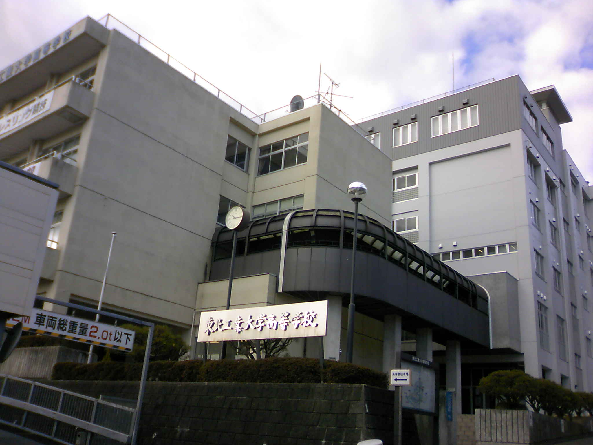 東北工業大学高等学校